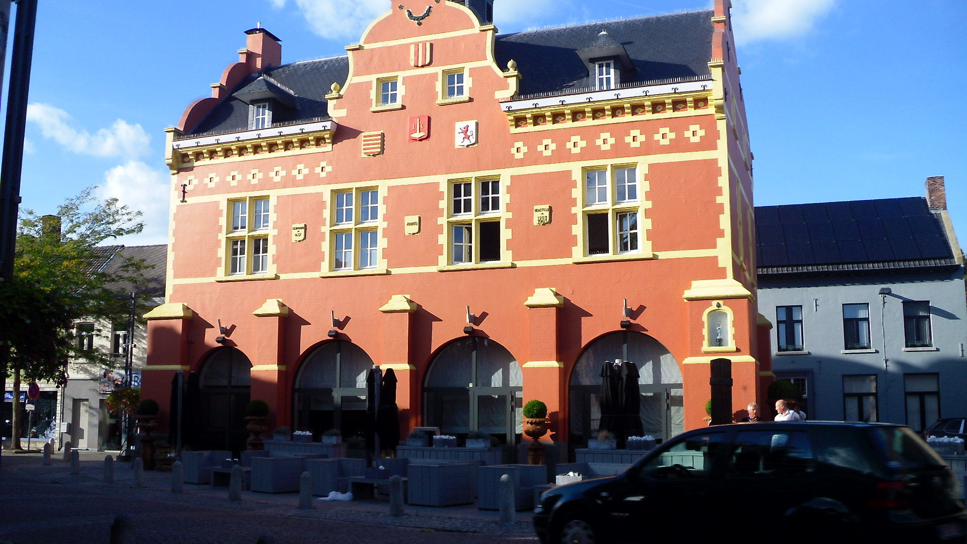 Het voormalig stadhuis van Peer werd ook gebruikt als : stadhuis Peer, schepenbank, griffie, lakenhal, overdekte markt, gevangenis en brandspuithuis . De dag van vandaag wordt er een gezellige brasserie uitgebaat.